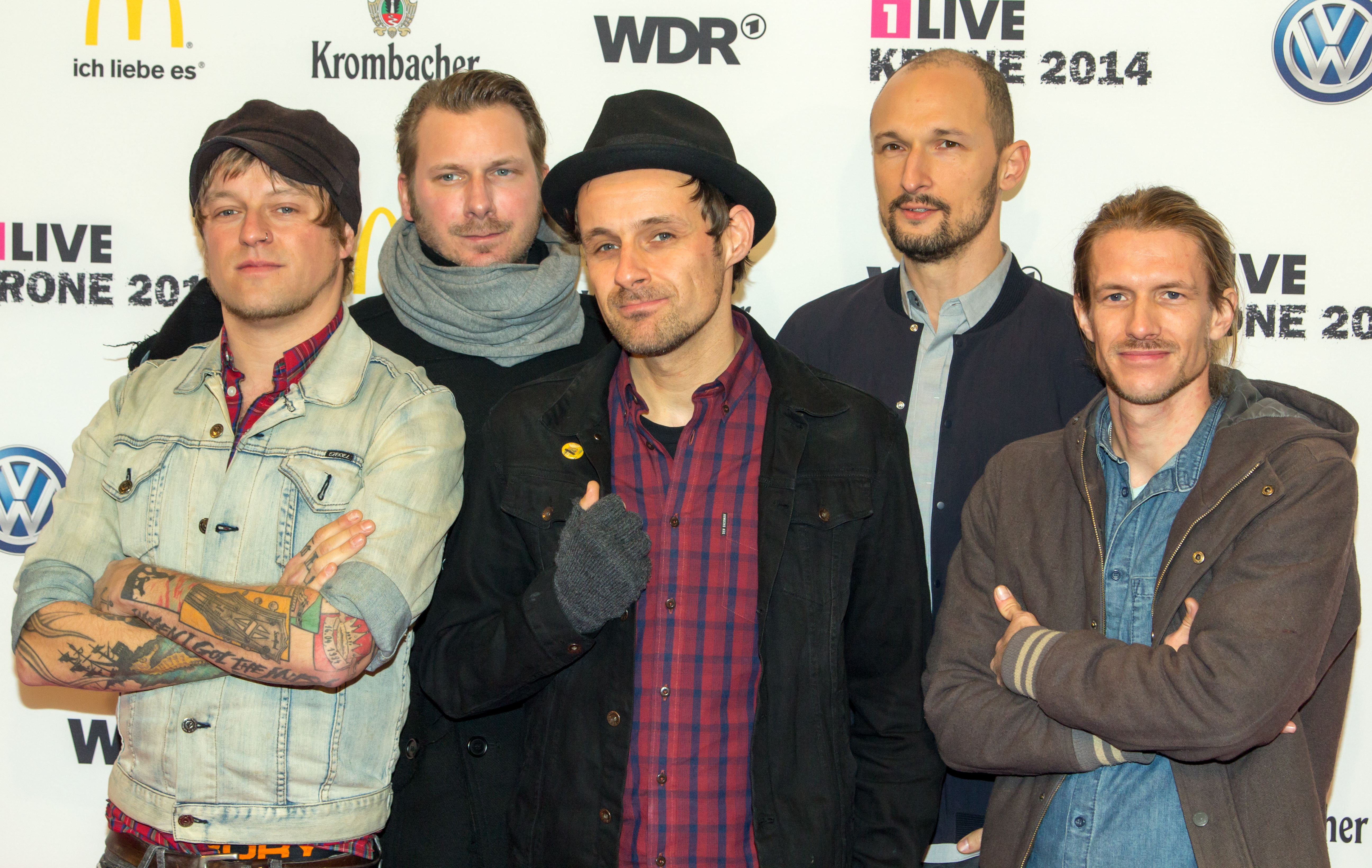 1LIVE Krone 2014 in der Bochumer Jahrhunderthalle: Donots auf dem roten Teppich